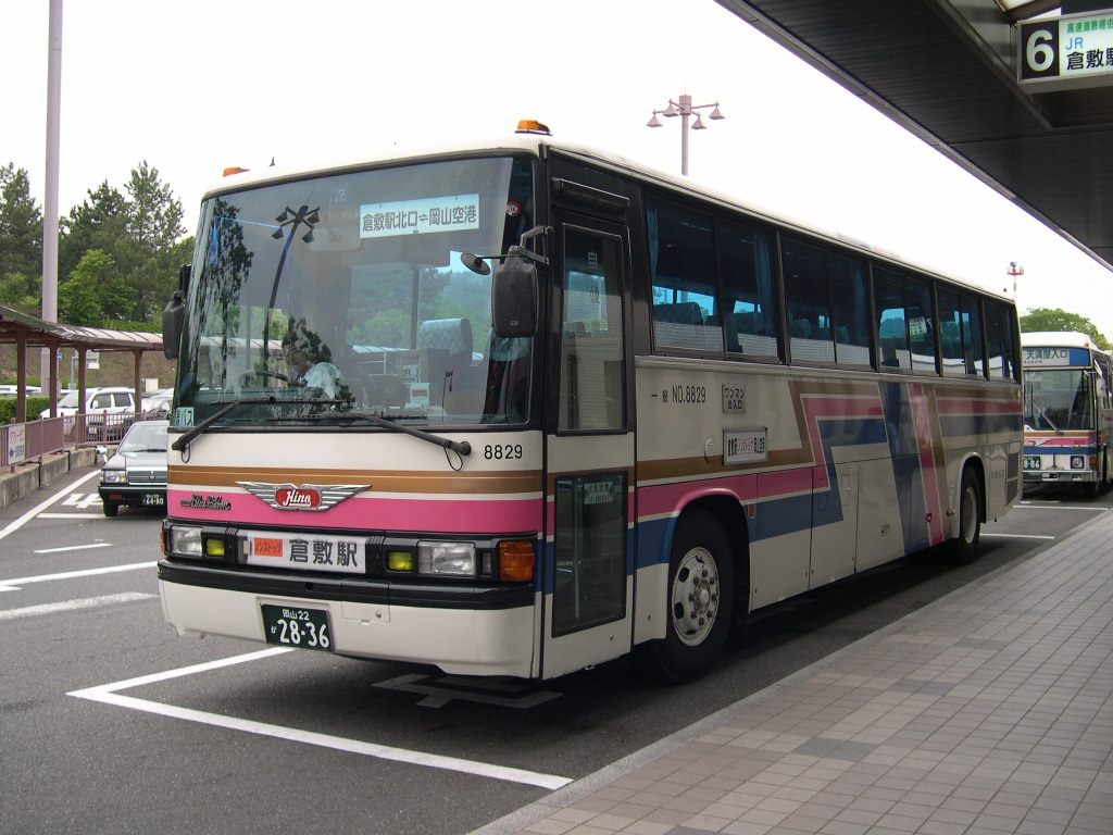 岡山空港にて 2004-5-15撮影